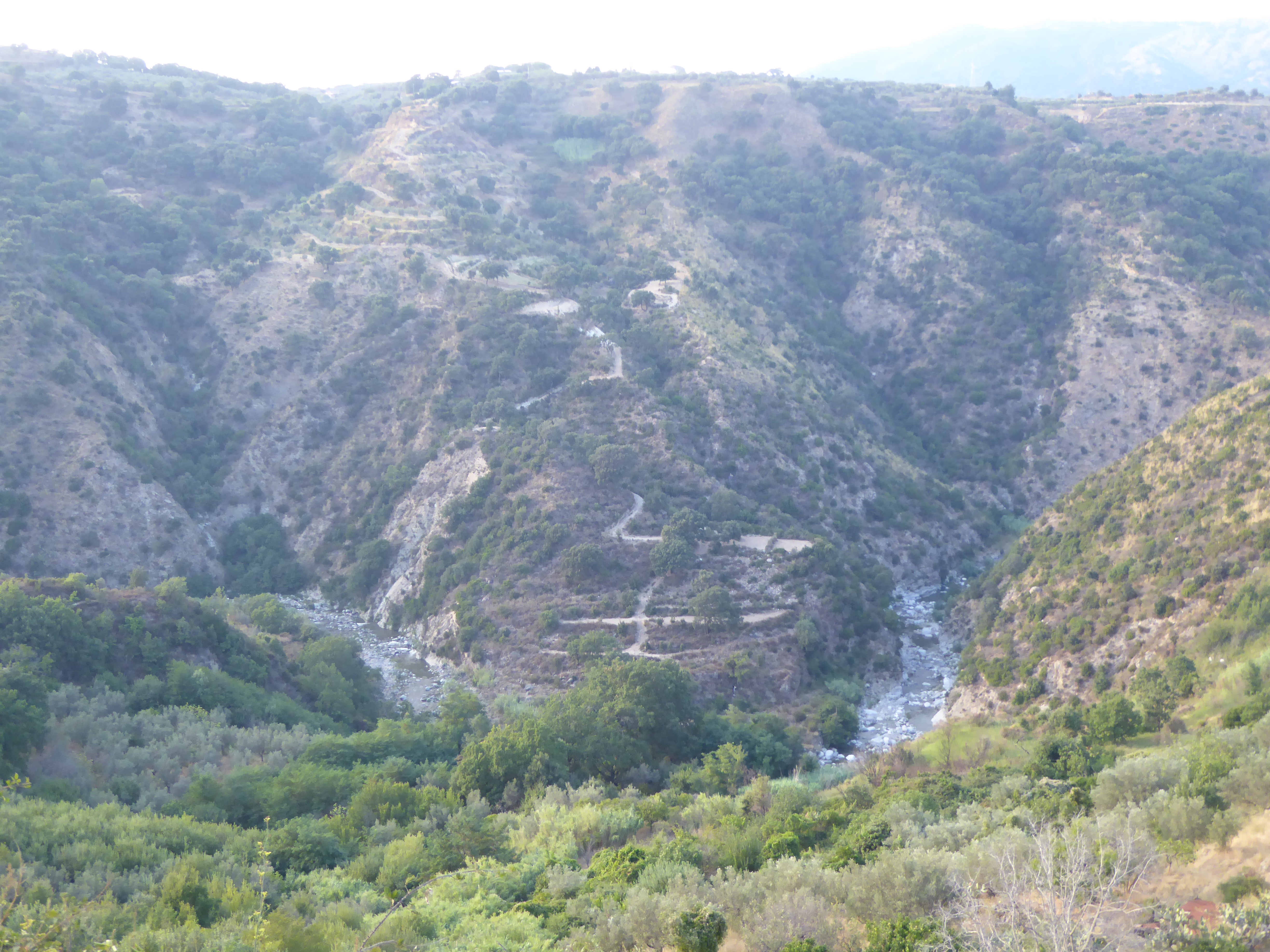 Fiumara Ancinale a Satriano (agosto 2019)